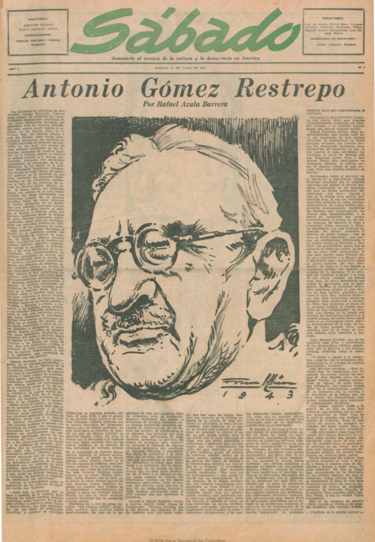 Foto de la primera página de la primera publicación del periódico Sábado